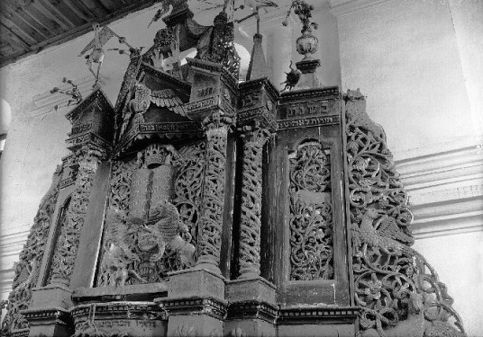 Беларуская (тарашкевіца): Зэльва (Zelva). Сынагога